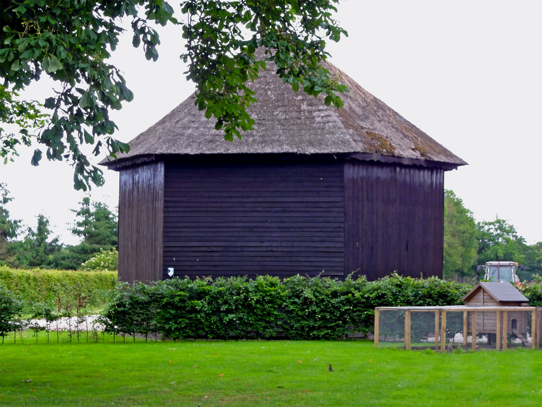 Hooischuur bij Hoeve Prinses Marianne van de Maatschappij van Weldadigheid - Koningin Wilhelminalaan 33 Wilhelminaoord - rijksmonument